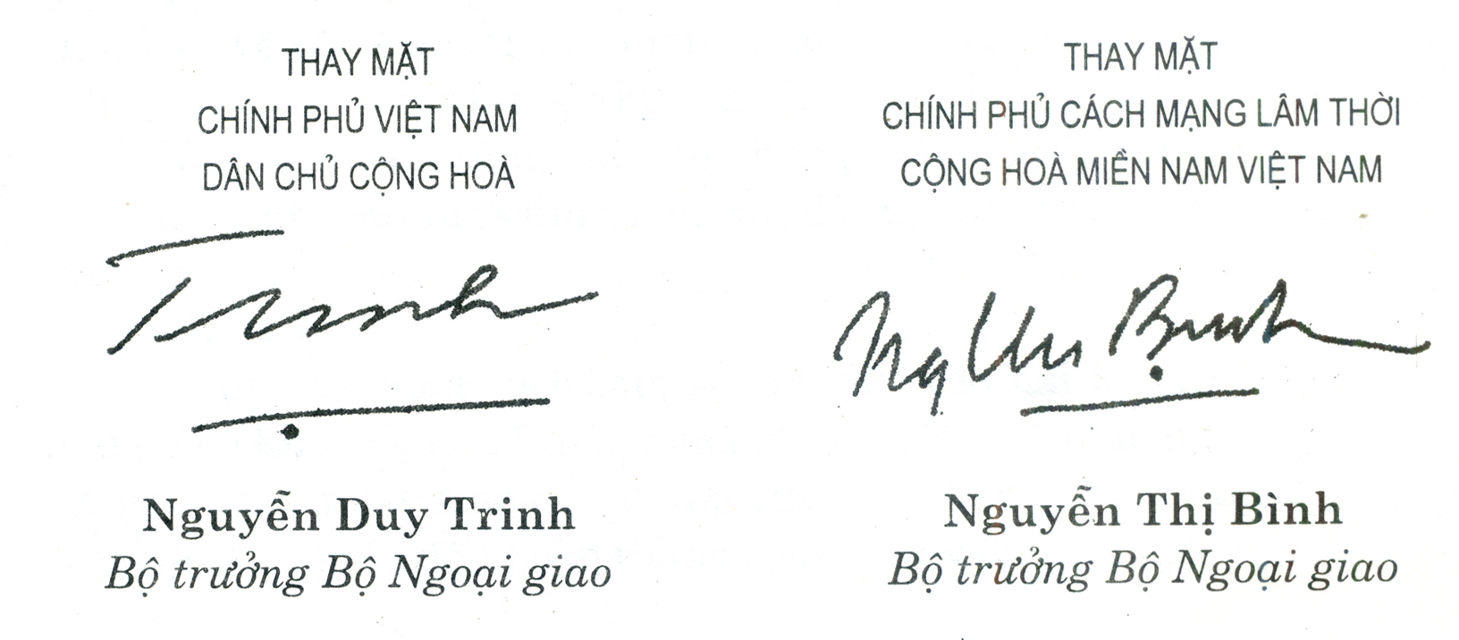 Chữ ký của Bộ trưởng ngoại giao Việt Nam Dân chủ Cộng hòa Nguyễn Duy Trinh và Bộ trưởng ngoại giao Chính phủ Cách mạng lâm thời Cộng hòa miền Nam Việt Nam Nguyễn Thị Bình tại Hiệp định Paris 1973 về Việt Nam